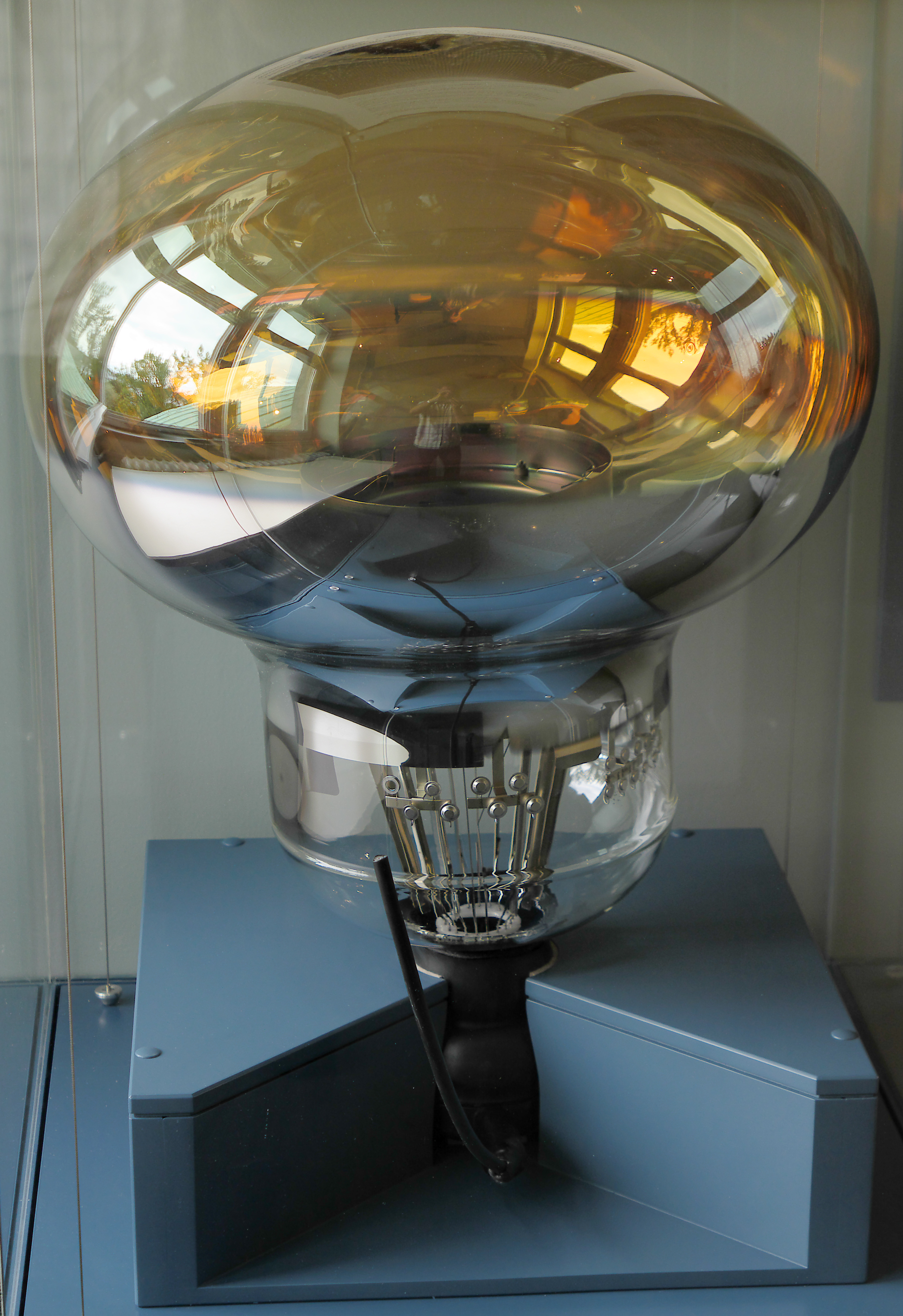 Großer Photomultiplier (zirka 50 Zentimeter Durchmesser) des Herstellers Hamamatsu Photonics.